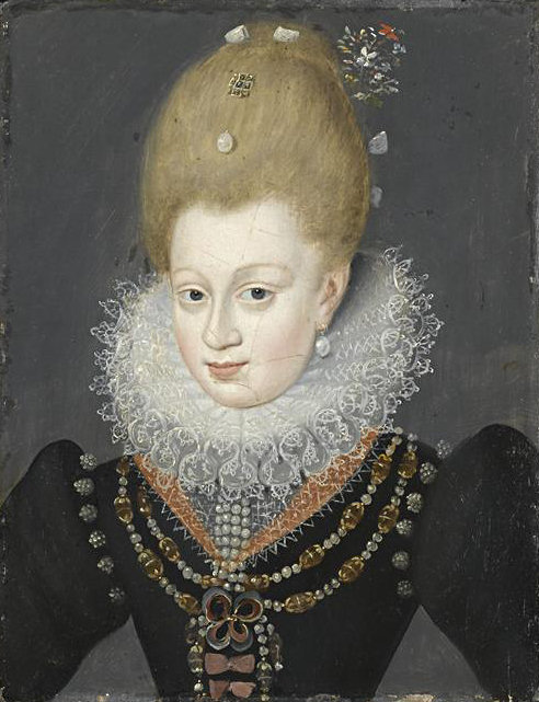 Portrait de Catherine Henriette de Balzac d'Entragues Anciennement identifié à Gabrielle d'Estrées.